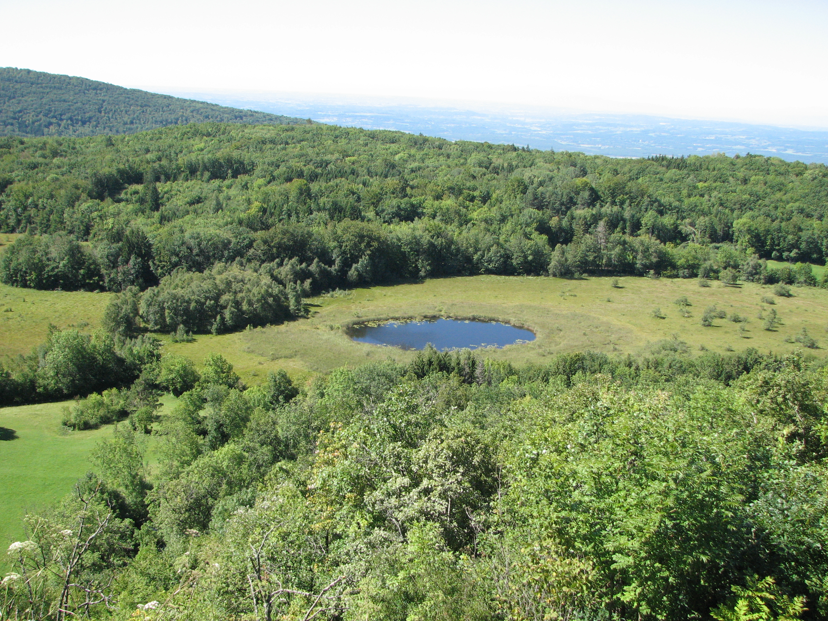 Tourbière de Cerin (Ain, France)